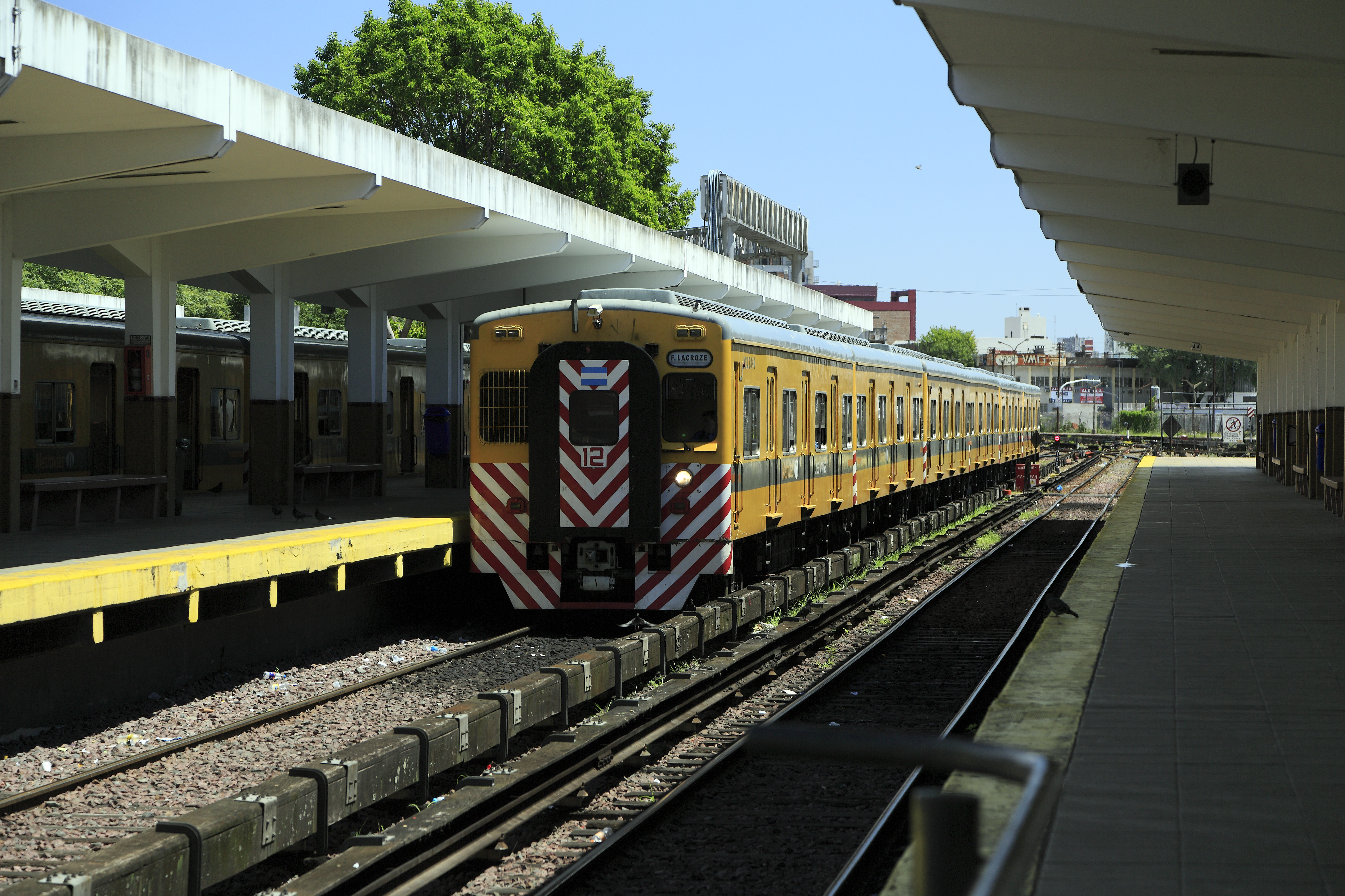 Einfahrender Triebzug von General Lemos, das Spitzensignal fällt mit nur einem Licht ausgesprochen sparsam aus.